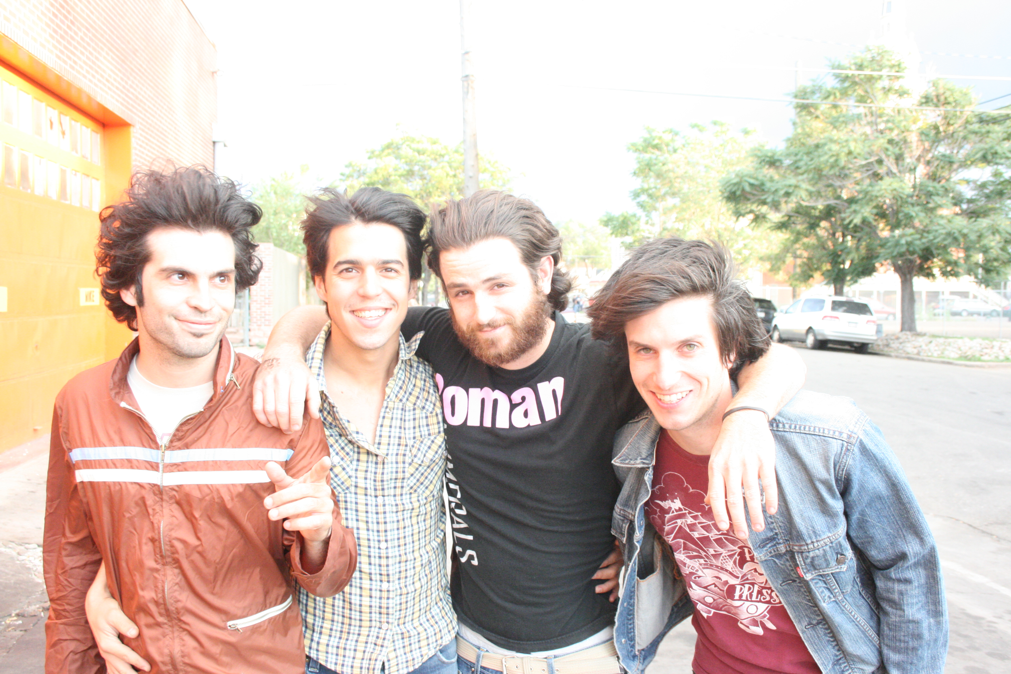 Interview w/Birdmonster :: Larimer Lounge :: 09.28.08